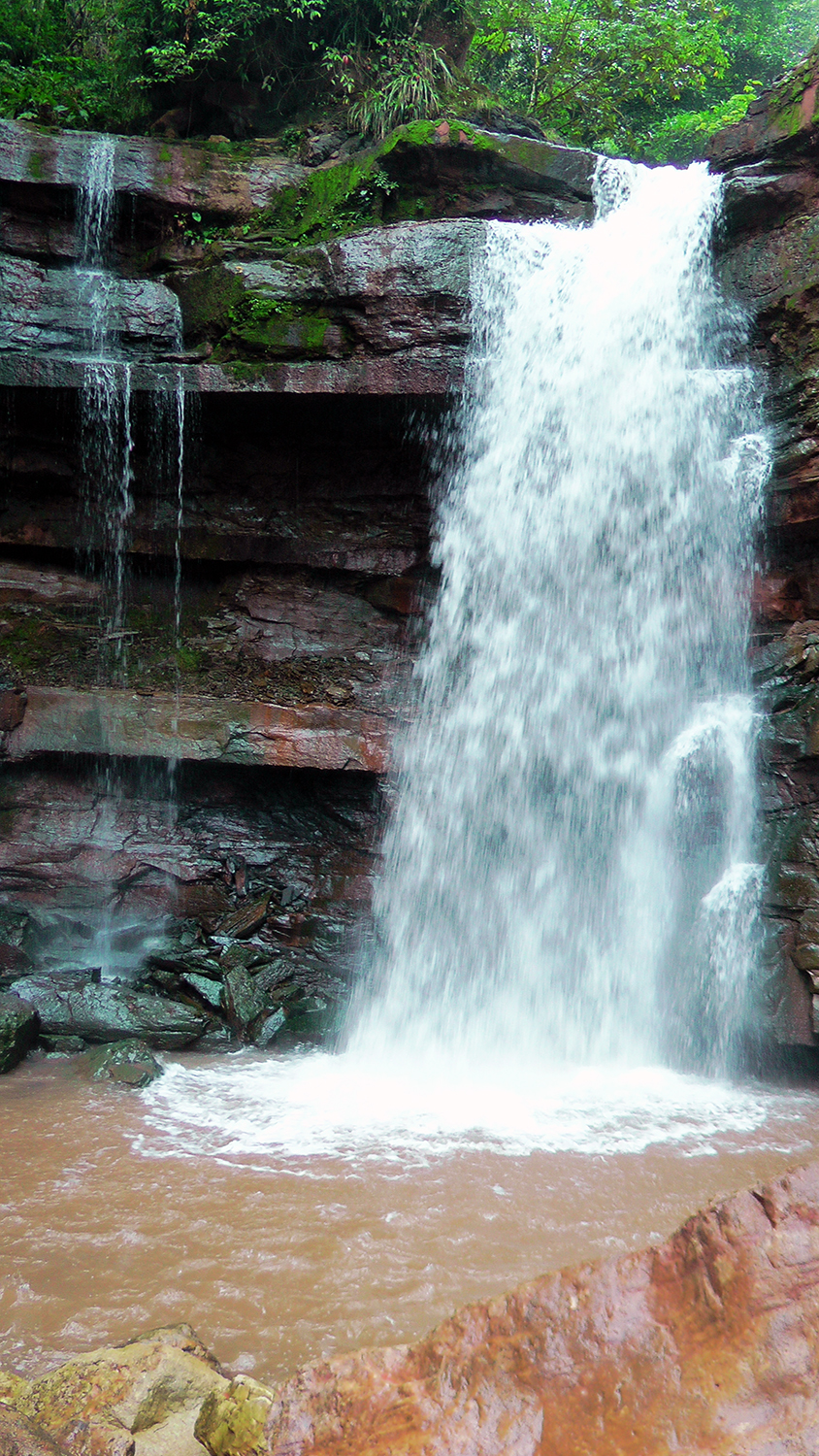 CASCADA GUACAMAYO